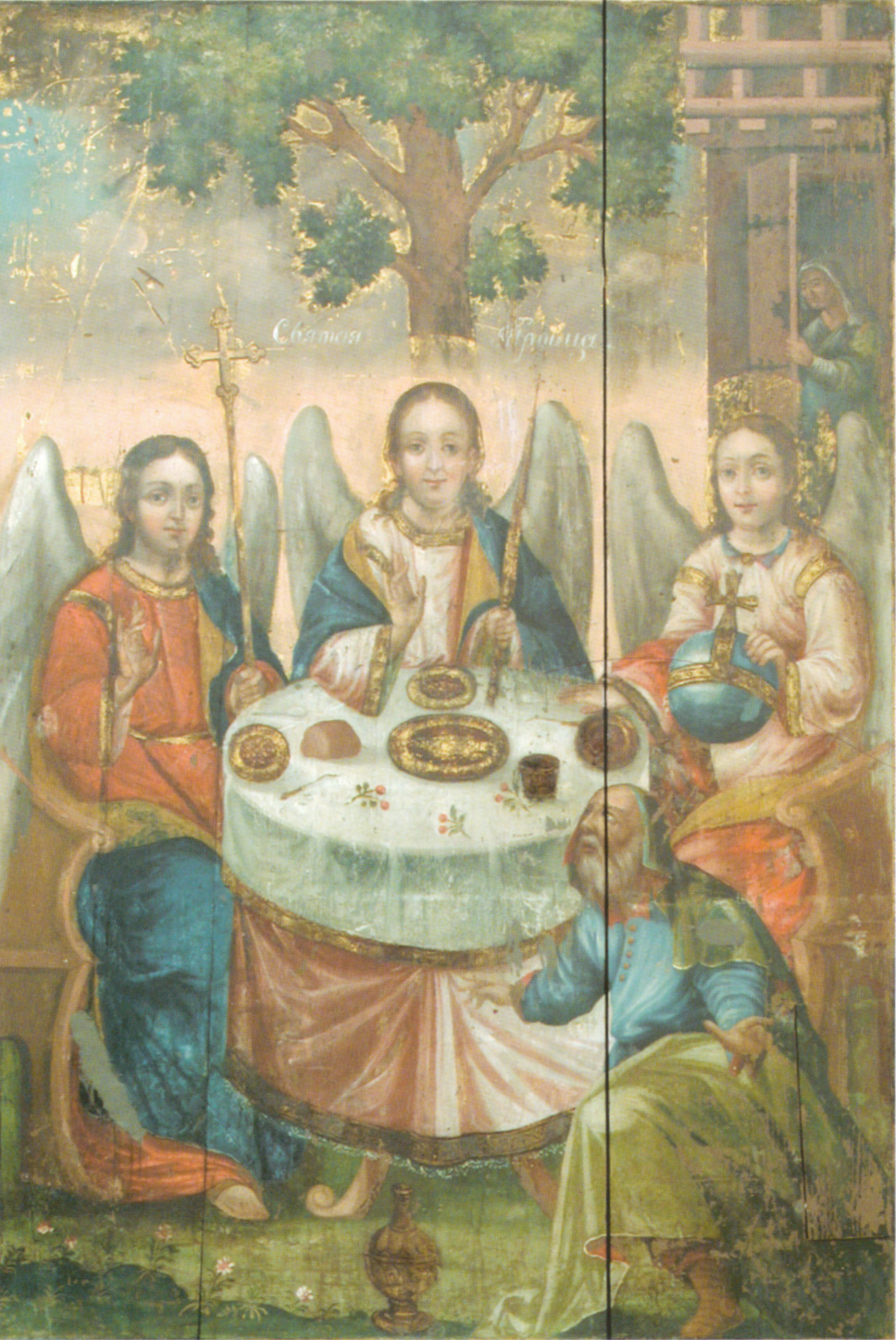 Абраз «Тройца старазапаветная», Дошка, алей, залачэнне. 134х93х3. Мясцовая школа. Перададзена ў Сафійскі сабор у 1951 г. Рэстаўрацыя - У. Ракіцкі (2001)